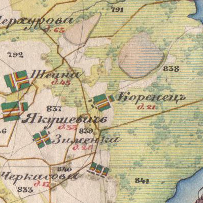 Деревня Коренец на карте 1850 года